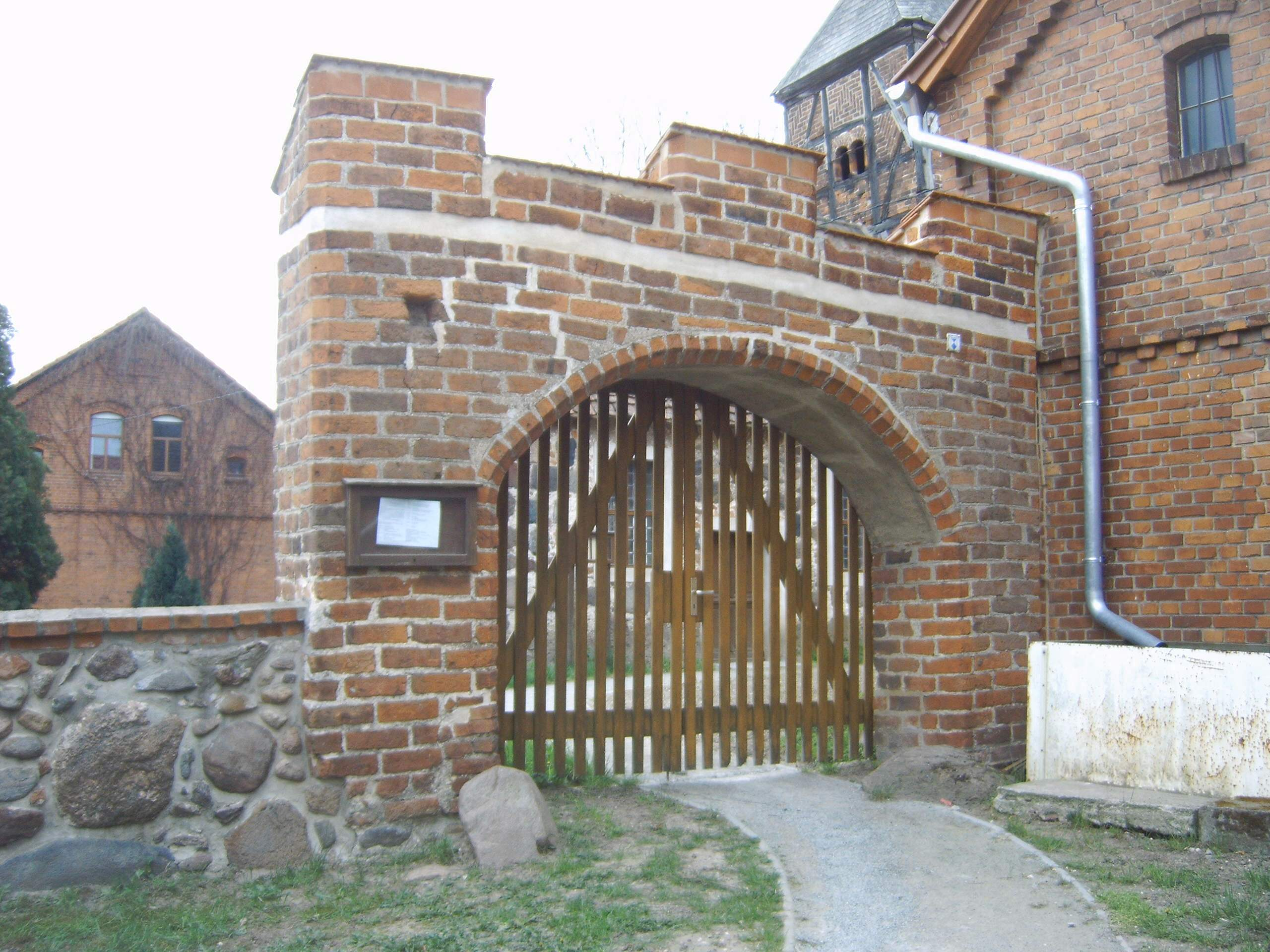 Tor zum Gelände der Dorfkirche Dahrenberg